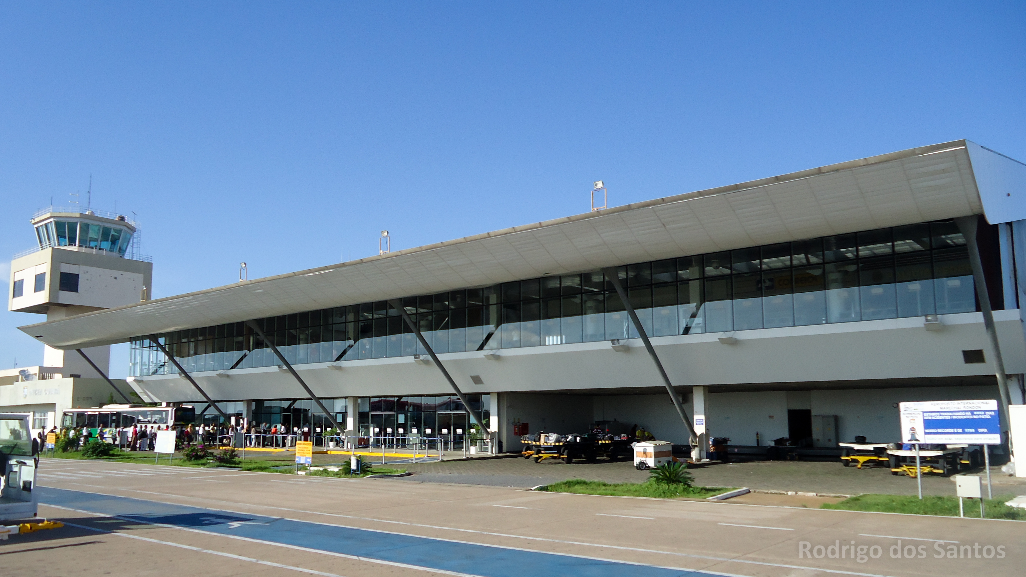 Aeroporto Marechal Rondon - Várzea Grande/MT